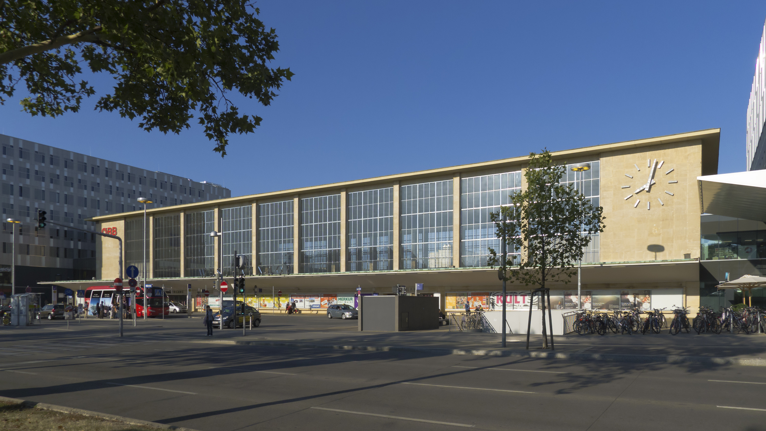 Westbahnhof in Wien 15, Europaplatz